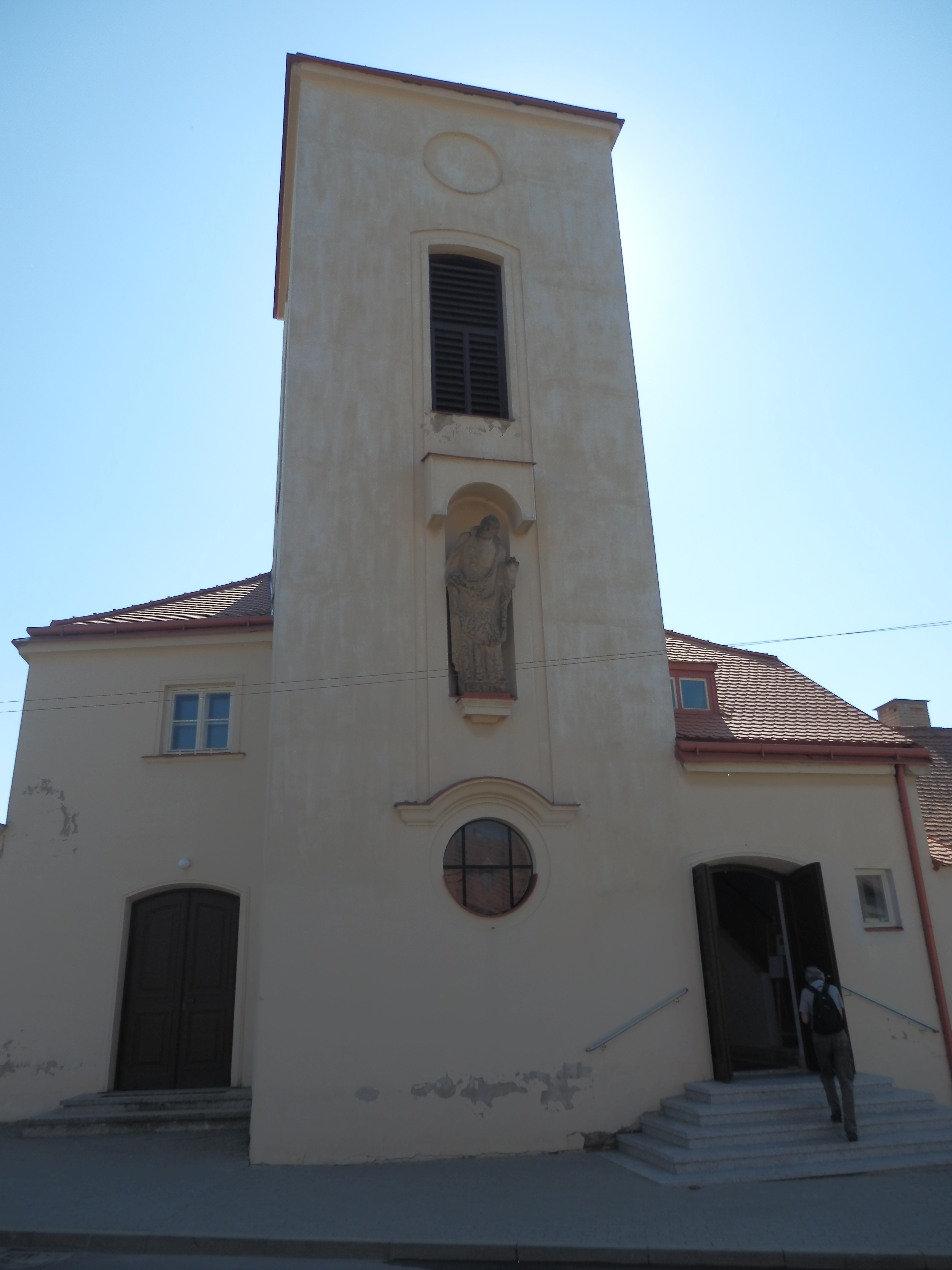 Kostel svatého Klementa Maria Hofbauera, Tasovice (okres Znojmo).